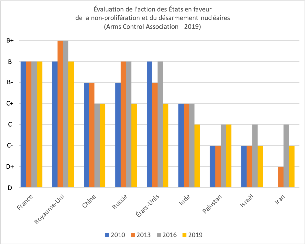 Graphique basé sur une « scorecard » publiée par l'Arms Control Association. Lien vers l'étude détaillée